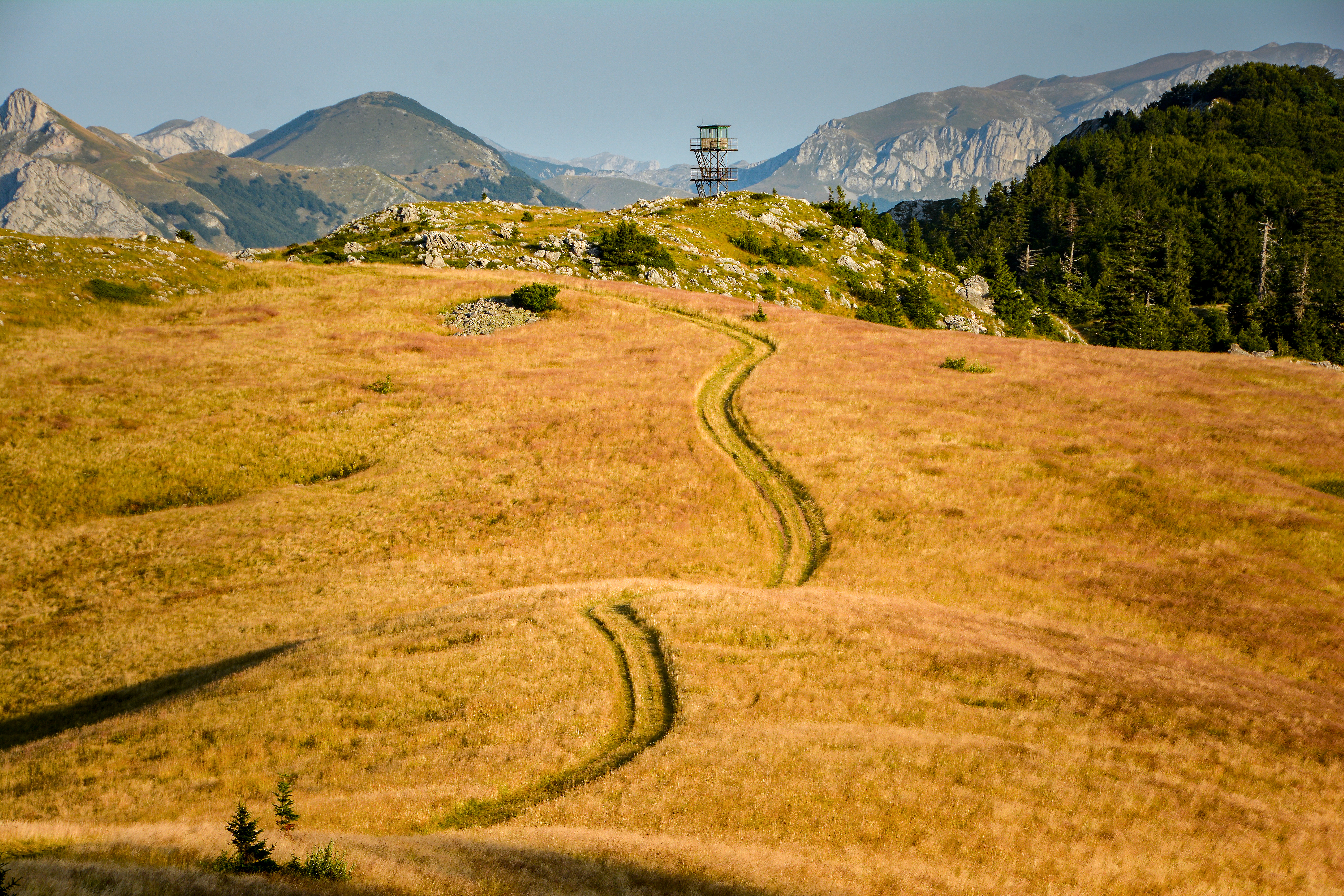 Prijevor